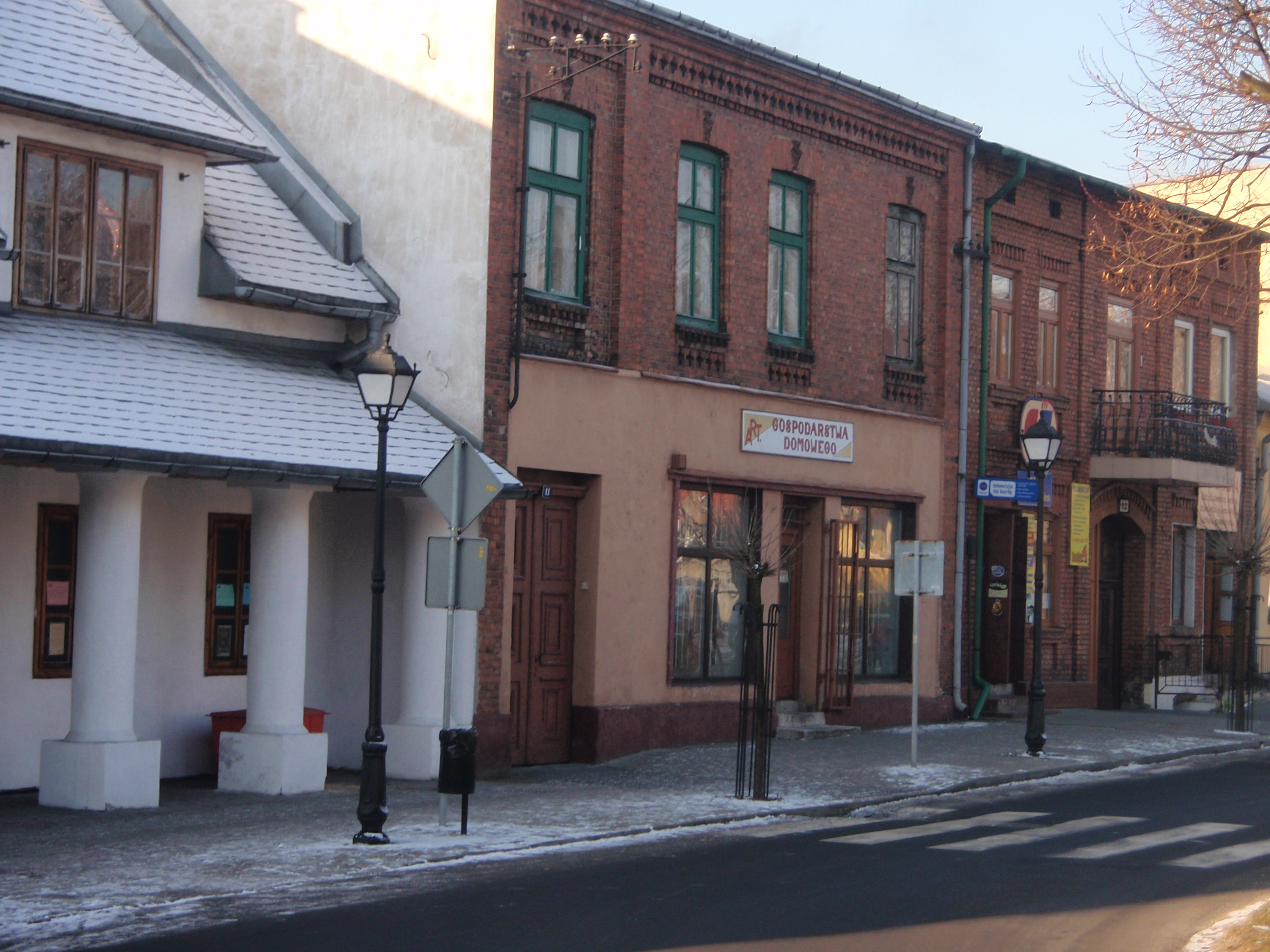 Sławków, woj. śląskie - północna pierzeja Rynku.